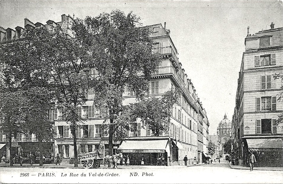 Paris, ca.1900, La Rue du Val-de-Grâce, 5e arrondissement de Paris, prise du boulevard Saint-Michel.